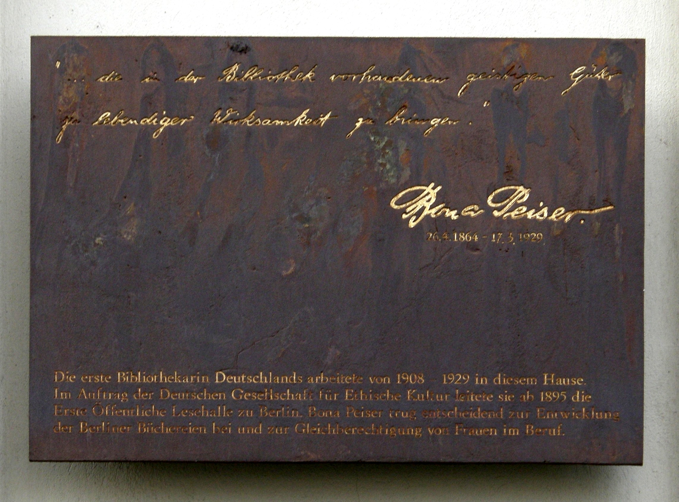 Gedenktafel für Bona Peiser am Gebäude Rungestraße 22-25 in Berlin-Mitte